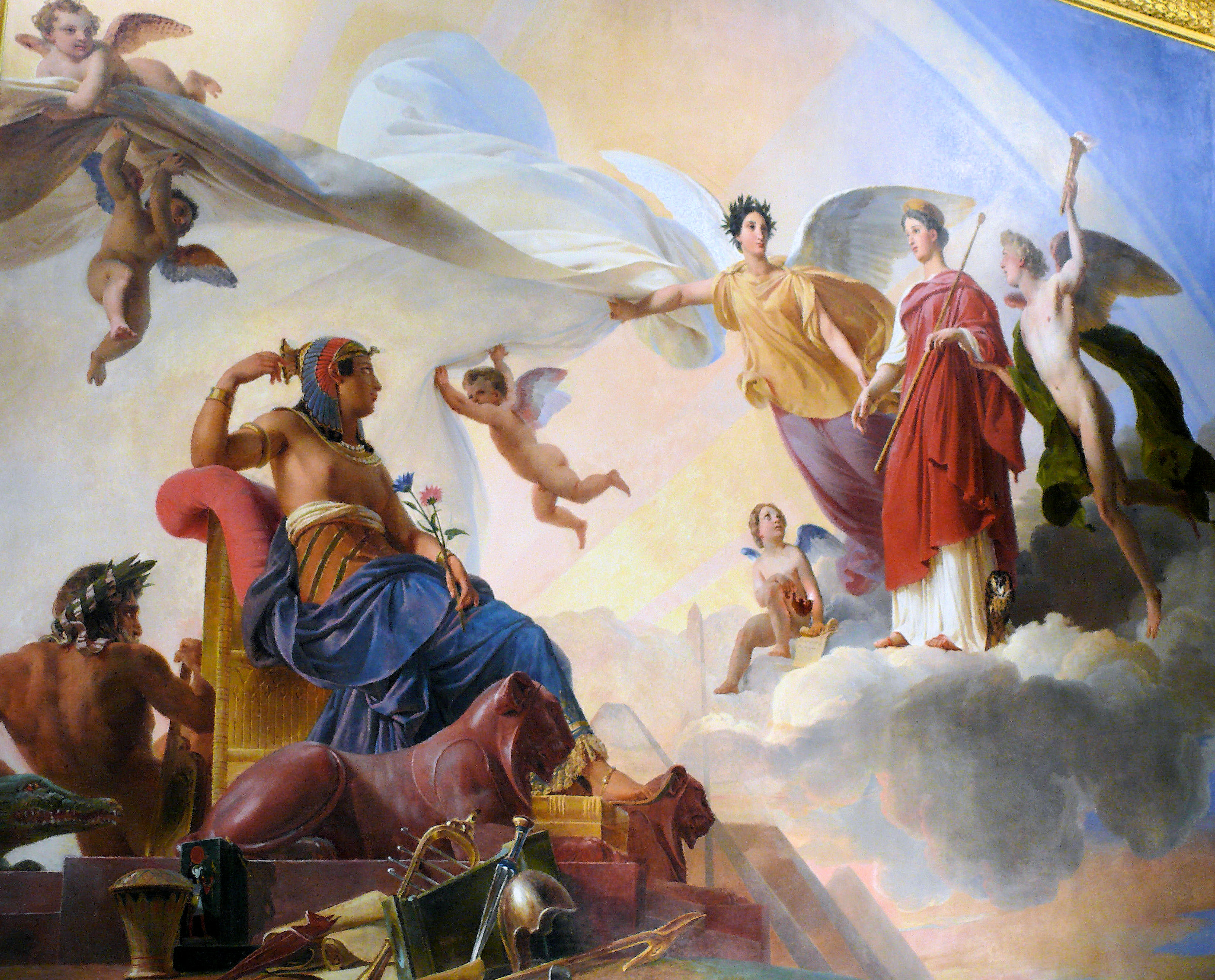 Palais du Louvre - Musée Charles X - Salle 6, peinture du plafond : L'Étude et le Génie dévoilent l'antique Égypte à la Grèce, par François-Édouard Picot